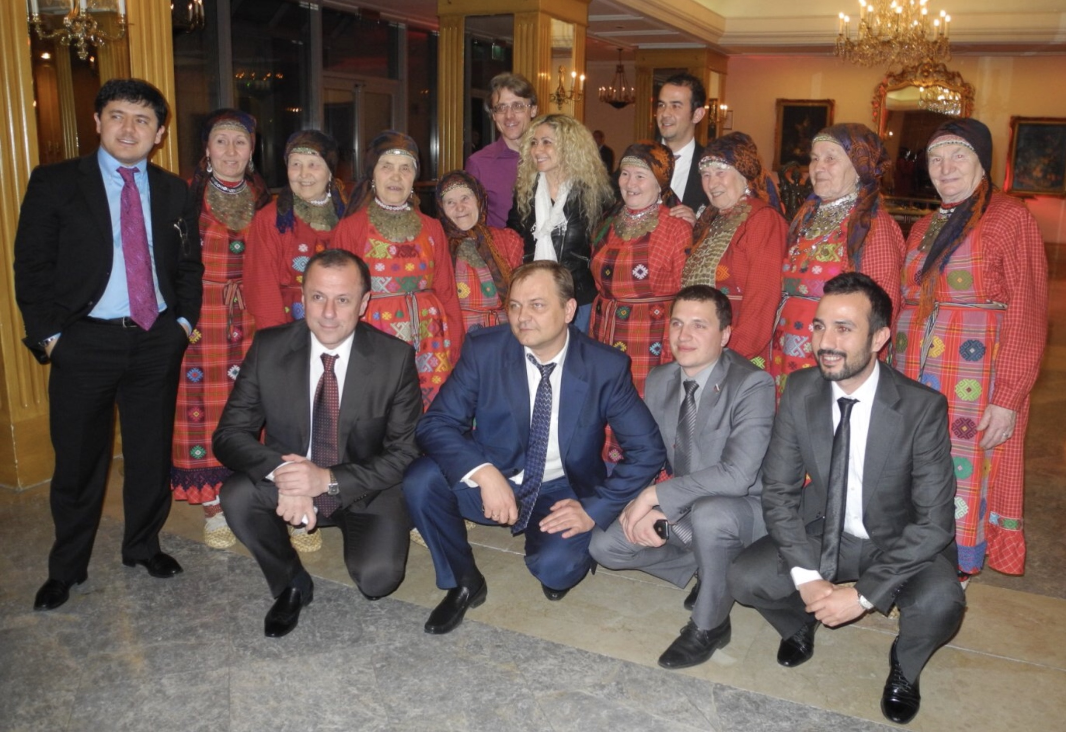 Бурановские Бабушки и организаторы премии "Золотая Колесница"